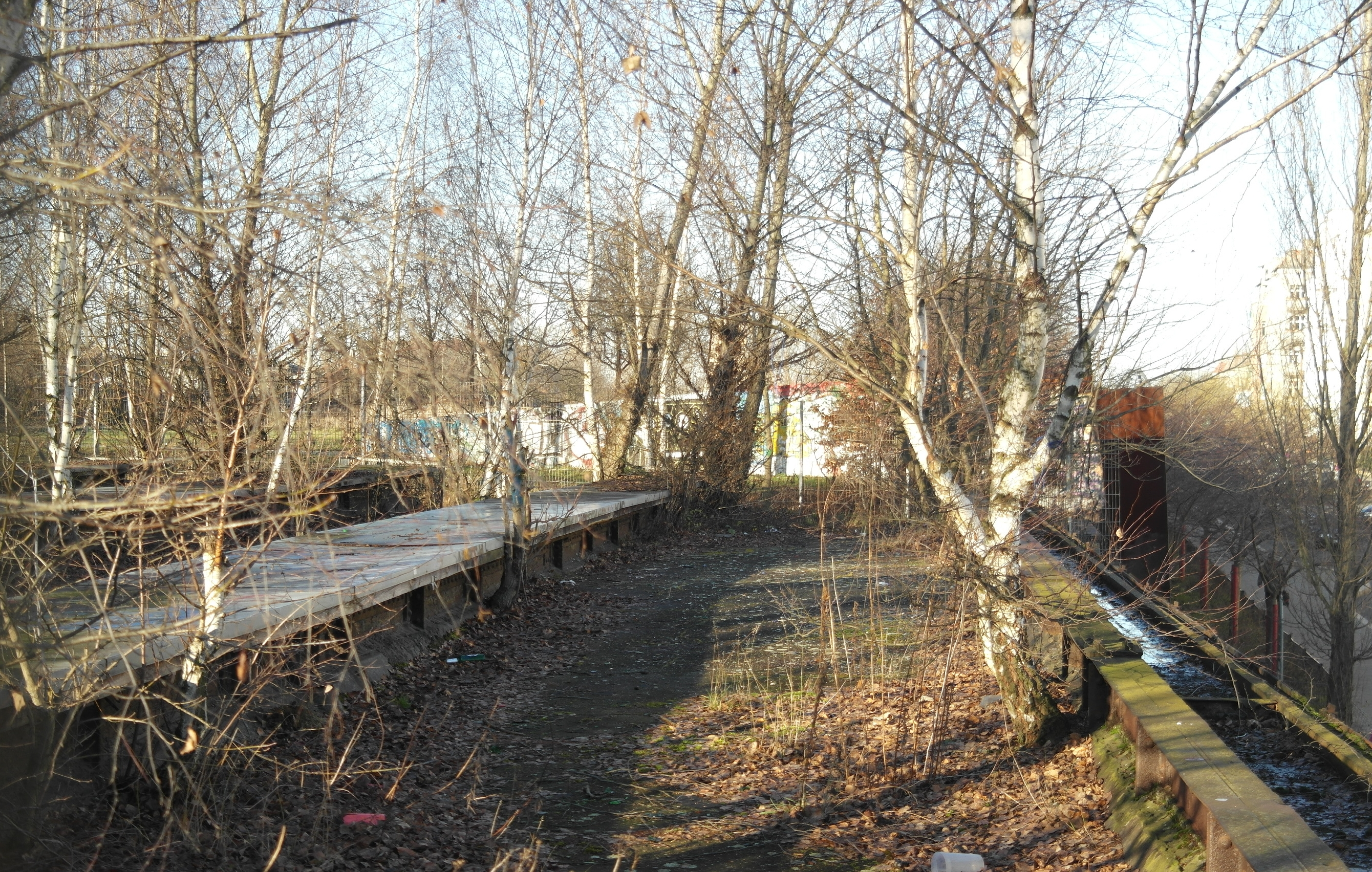 Brücken über den Gleimtunnel im früheren Güterbahnnhof Berlin Eberswalder Straße, davor Nordbahnhof